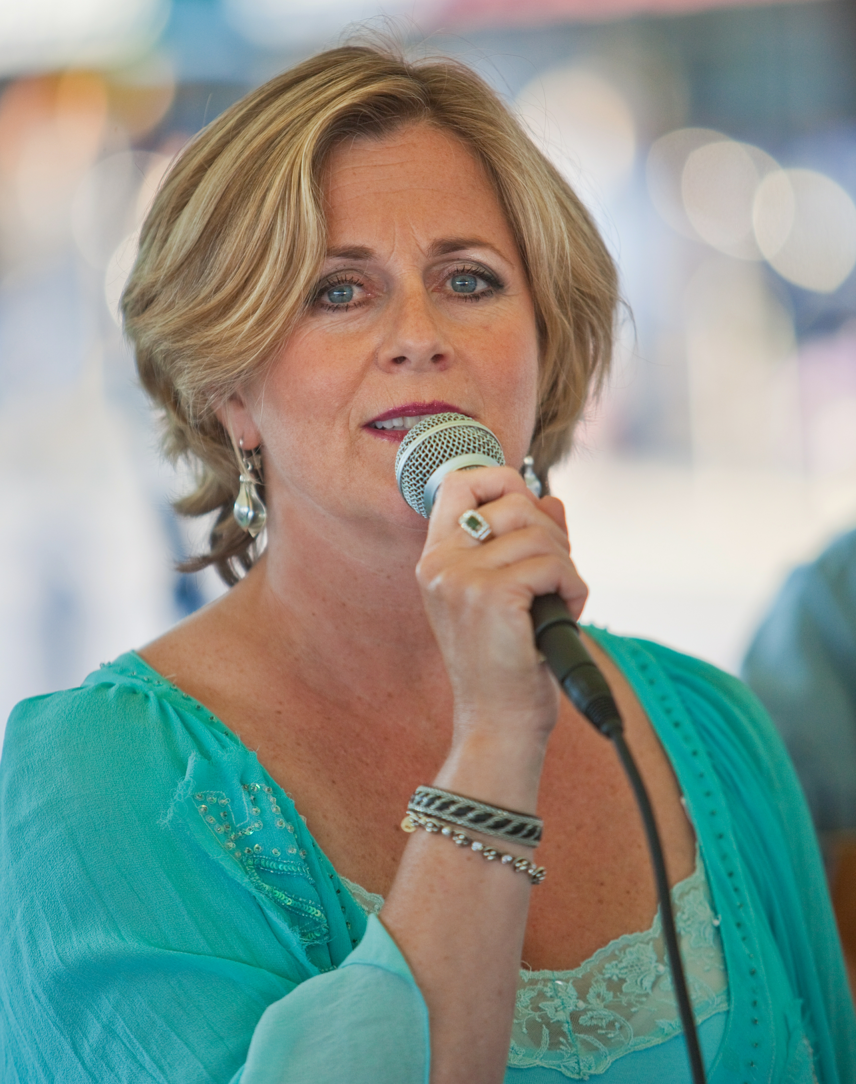 Gunilla Backman at Winbergs Vaxholm 2012